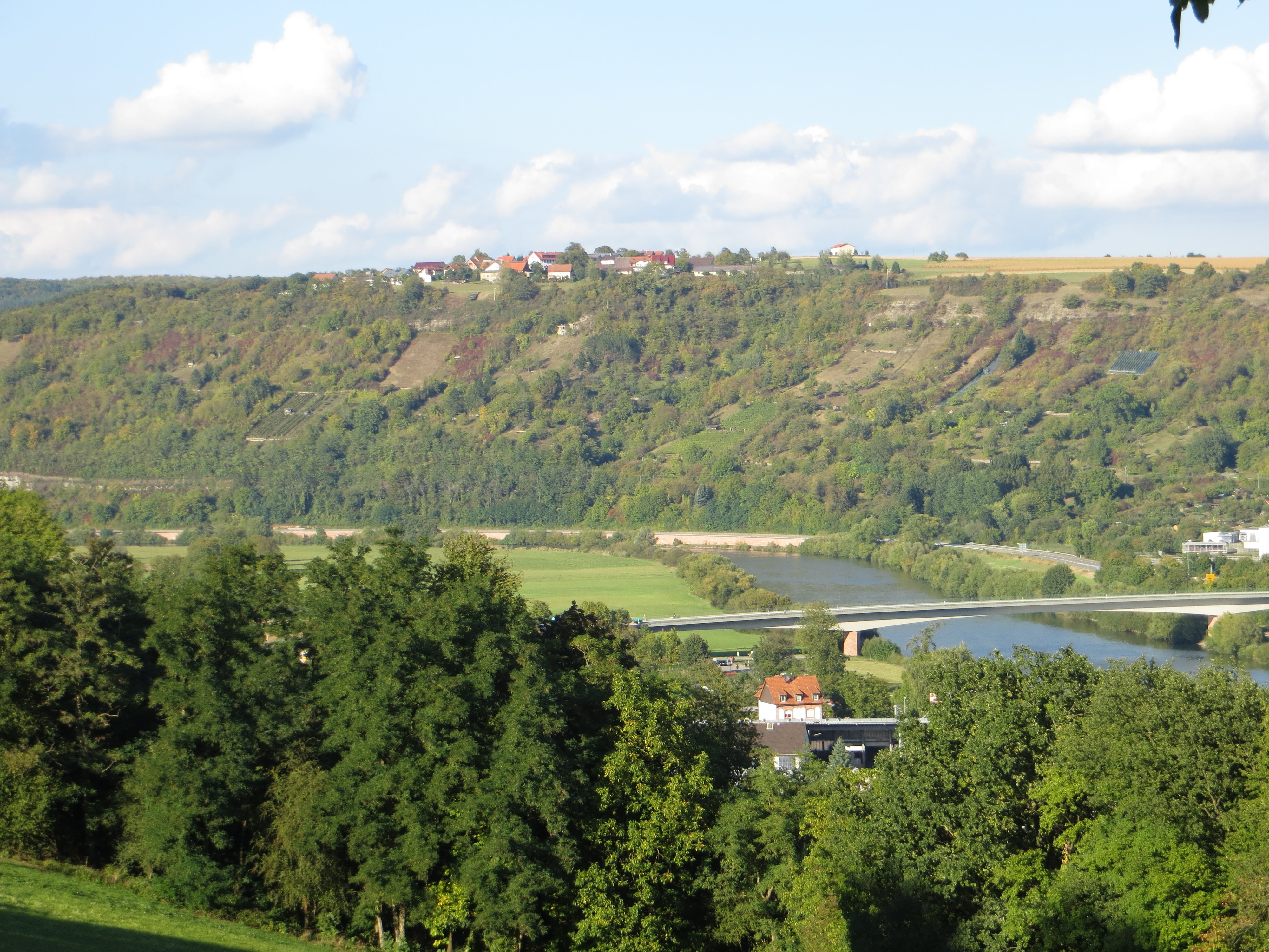 Blick ins Neckartal bei Mosbach-Diedesheim. Oberhalb des Neckars der zu Diedesheim gehörende Weiler Schreckhof.